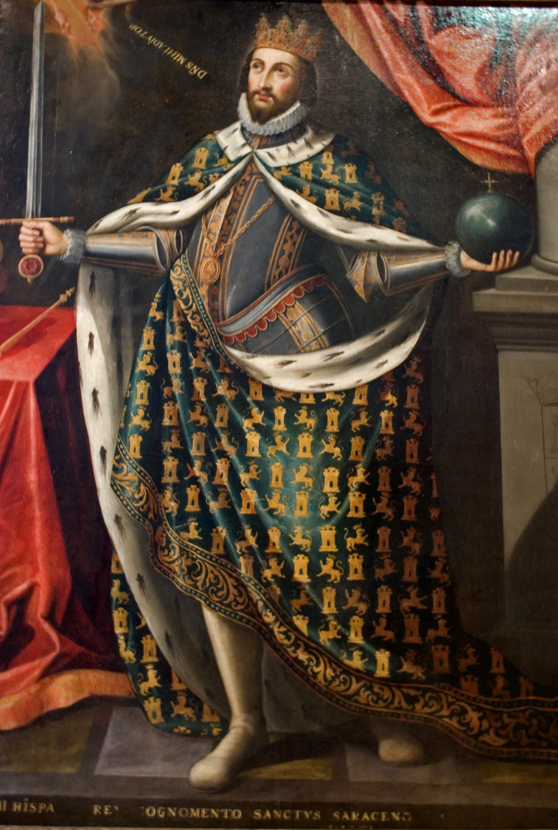 La obra representa al rey San Fernando († 1252), que reinó en Castilla y León como Fernando III y fue canonizado en 1671.